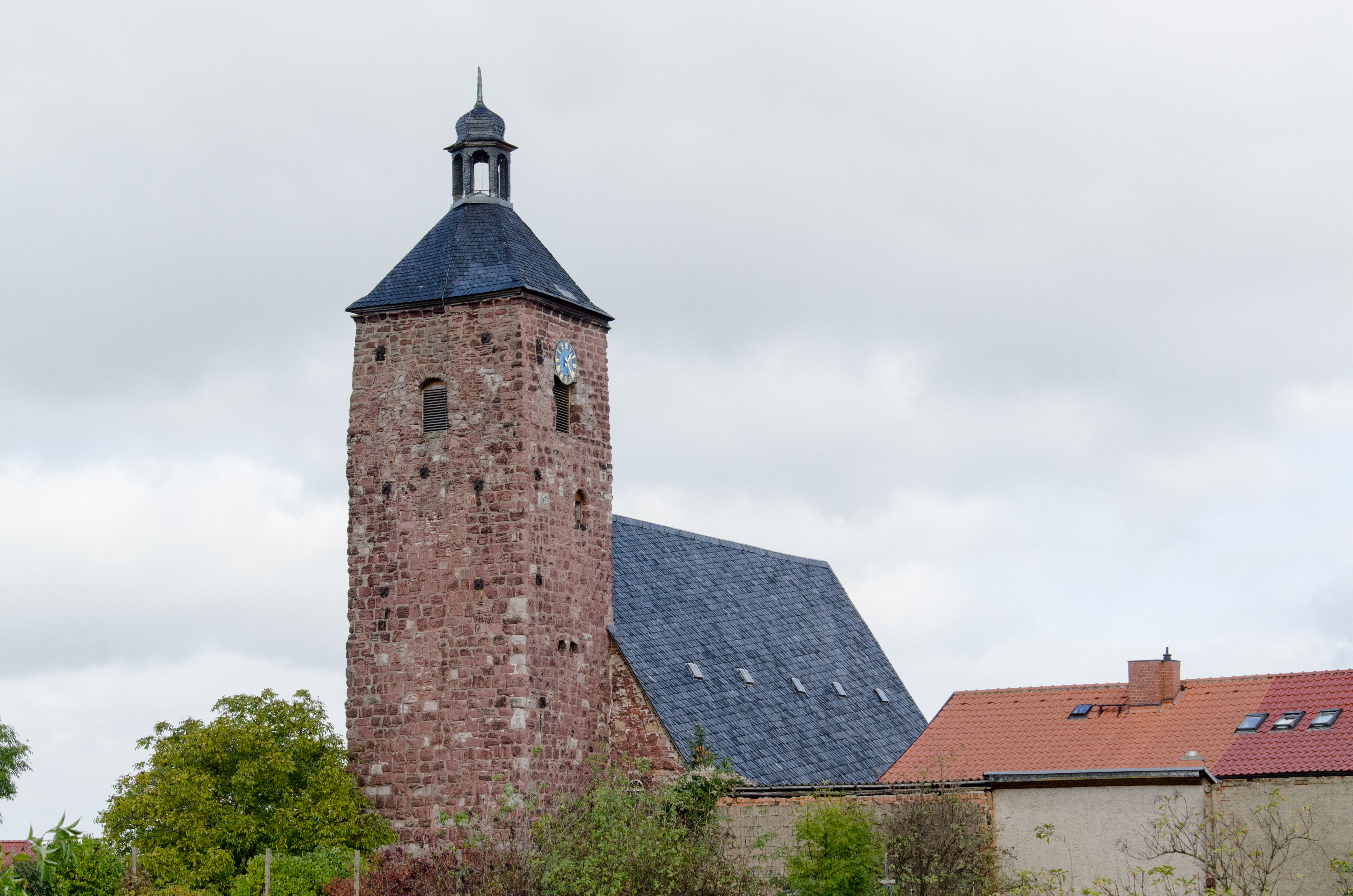 Kelbra, Kirche St. Georg